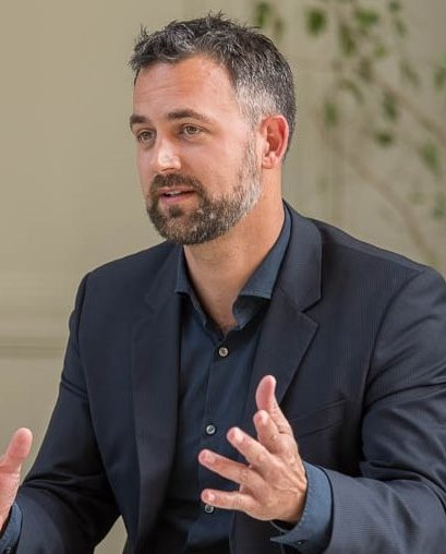 Offizielles Portraitfoto des Potsdam-Instituts